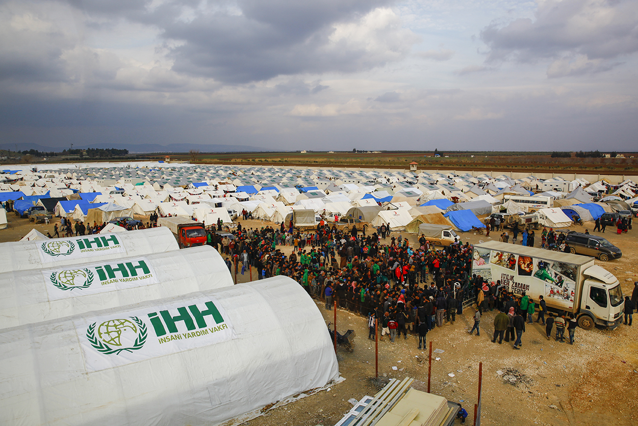 صورة تظهر جزء من أعمال الإغاثة والمساعدات الإنسانية لهيئة الإغاثة الإنسانية IHH في سوريا